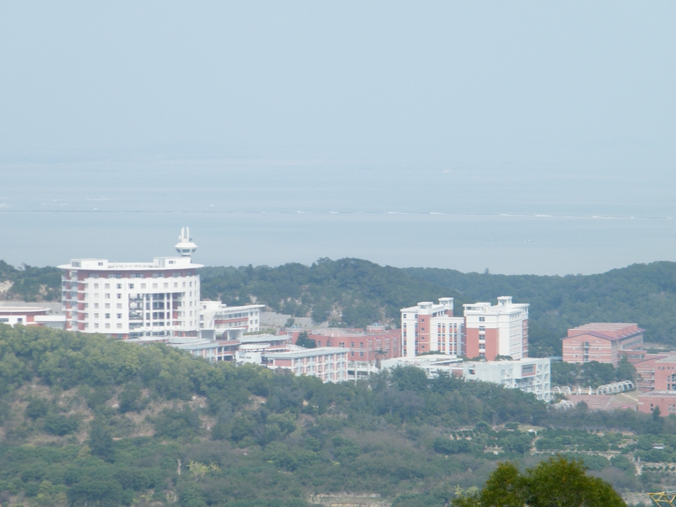 汕头职业技术学院 2011.1.29 拍于东湖岭山道